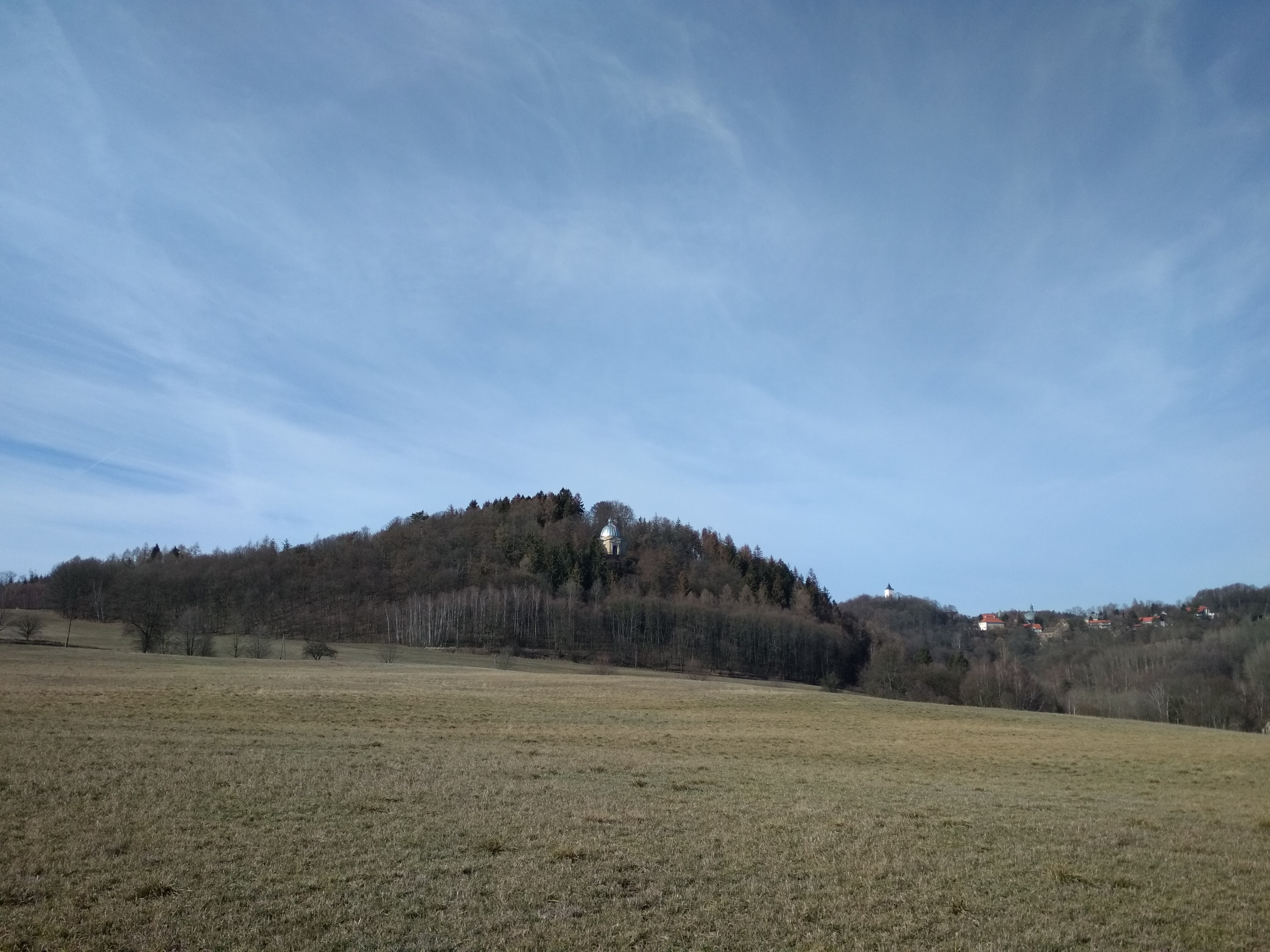 Hradec u Liběšic, dominantní prvek mauzoleum rodiny průmyslníka Schrolla, v pozadí městys Levín